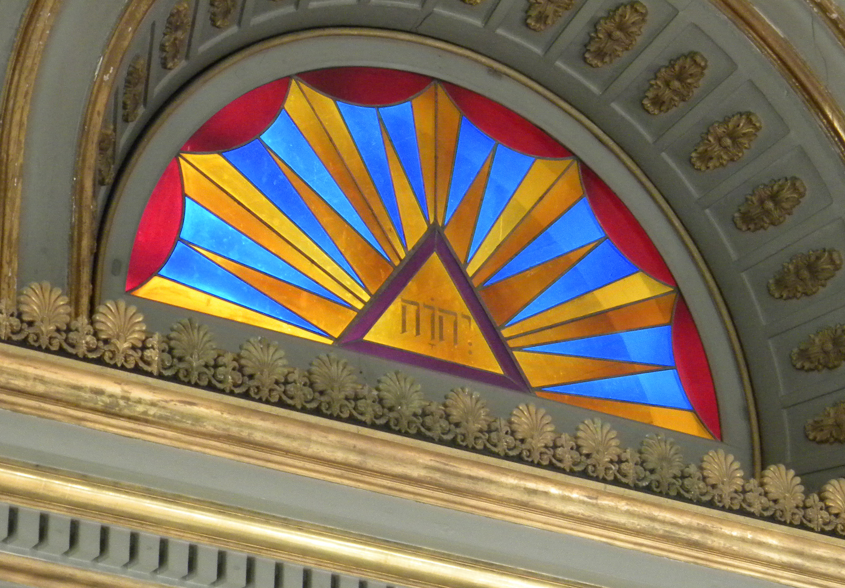 Altarkrön med tetragrammet JHWH i Röks kyrka